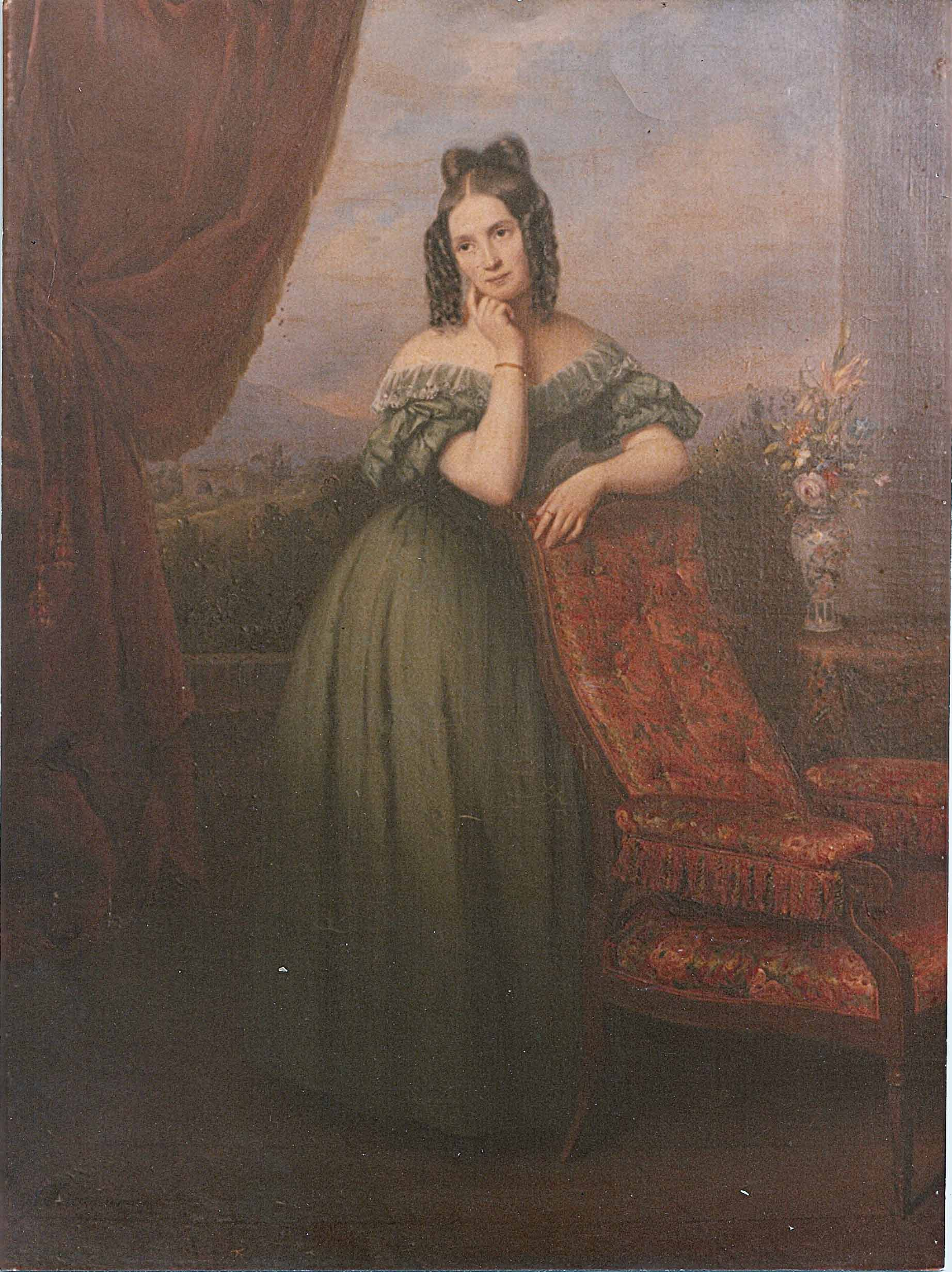 Sophie Löwengard Hohenemser, madre di Emma (Autore ignoto)